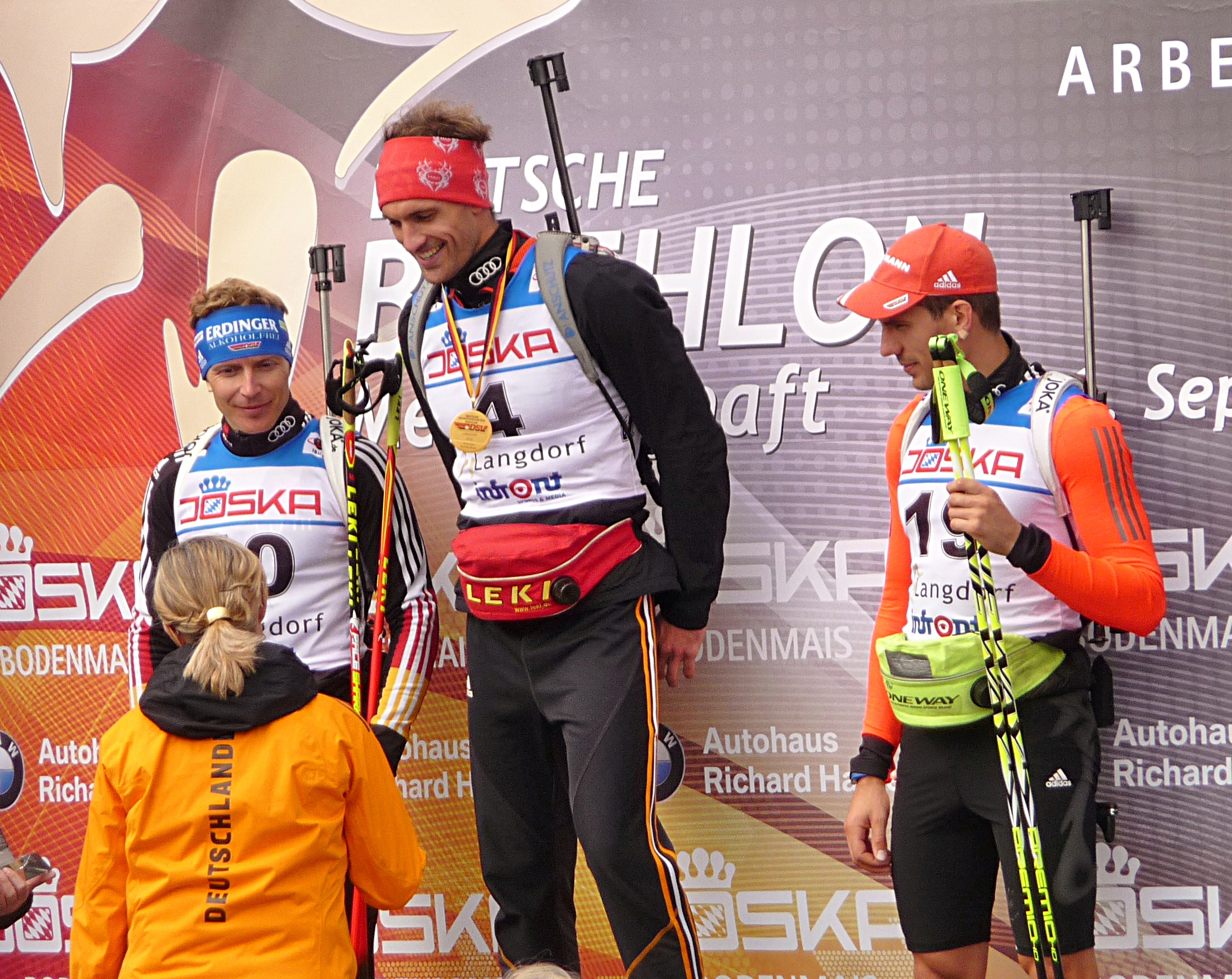 Die Siegerehrung im Sprint der Männer bei der Deutschen Biathlon-Meisterschaft 2015. Von links: Andreas Birnbacher, Michael Willeitner, Arnd Peiffer, mit DSV-Sportdirektorin Nordisch/Biathlon Karin Orgeldinger.